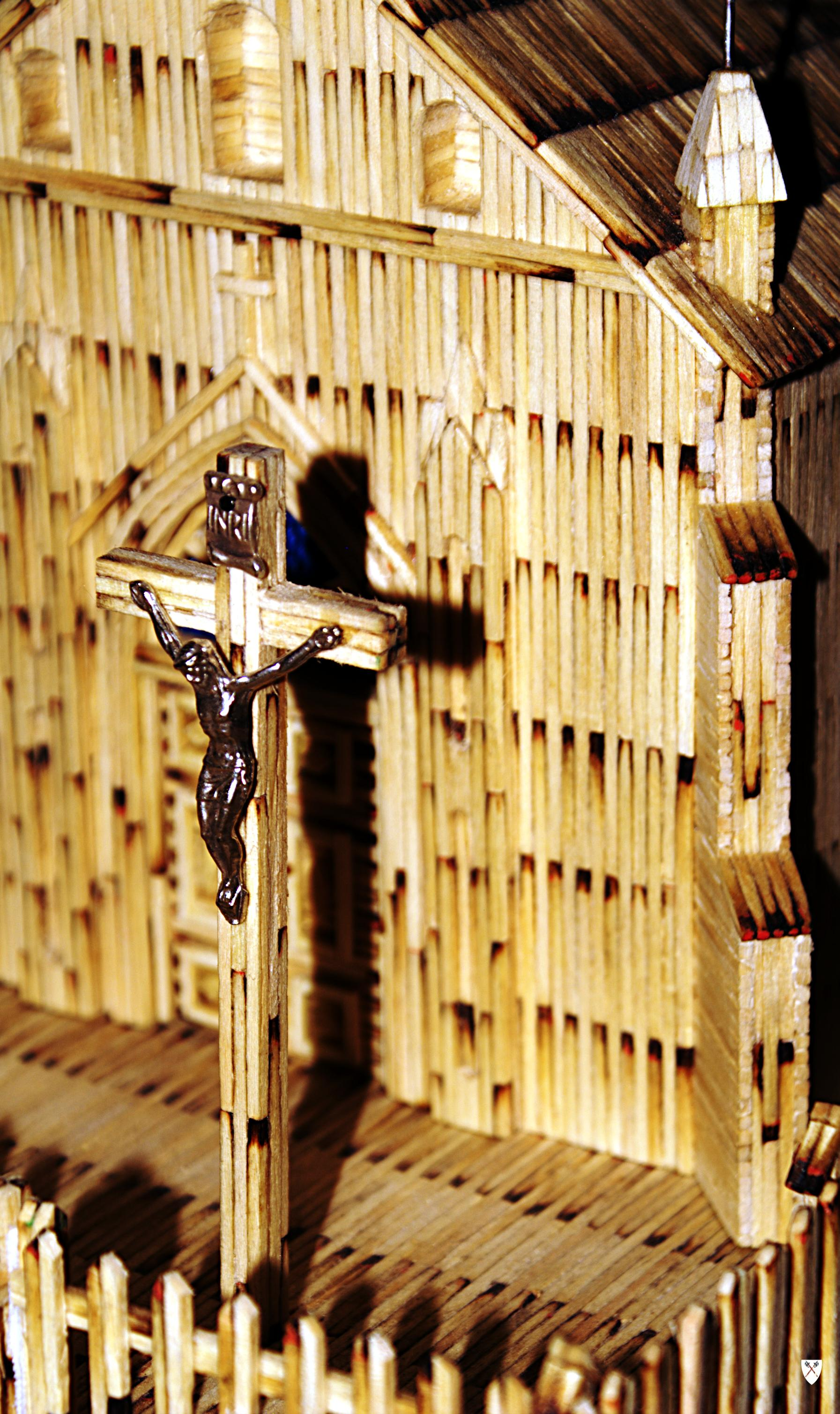 Model z zapałek na wystawie czasowej "Zapaleńcy" w Muzeum Górnictwa Węglowego w Zabrzu. Model wykonał Oswald Górecki.